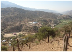 Vista General de la localidad de Chalhuani, en el Municipio de Pojo, en el Departamento de Cochabamba